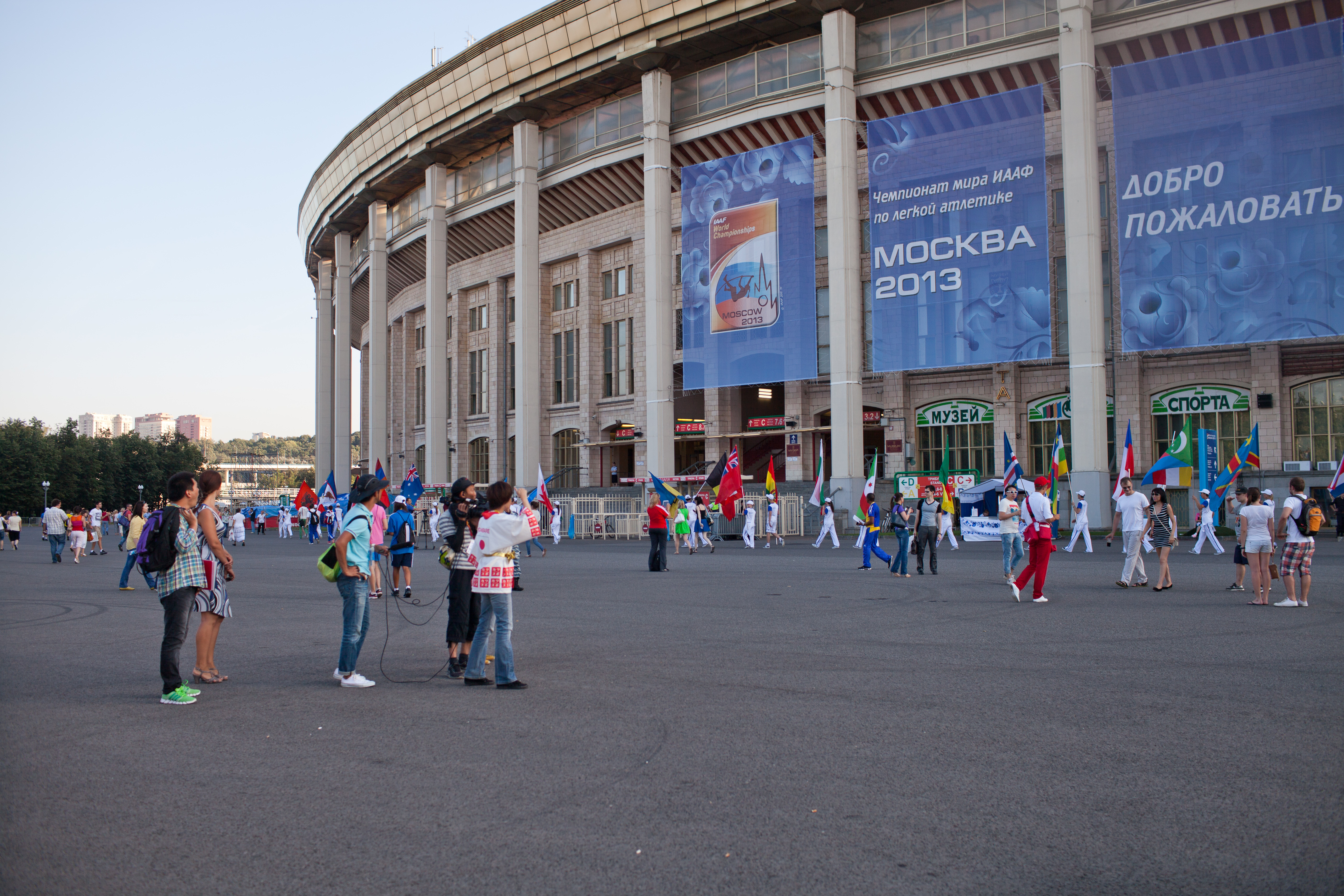 Первый день Чемпионата мира по легкой атлетике в Москве